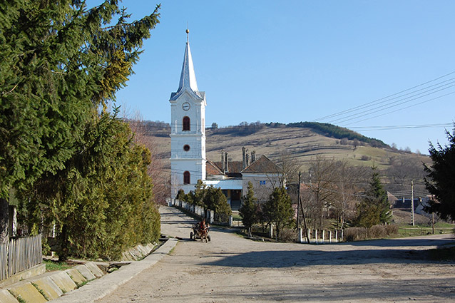 Ev. Kirchturm in Weilau (Uila), Siebenbürgen.